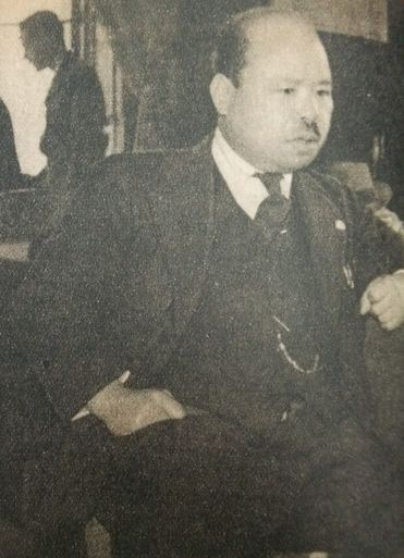 佐竹晴記